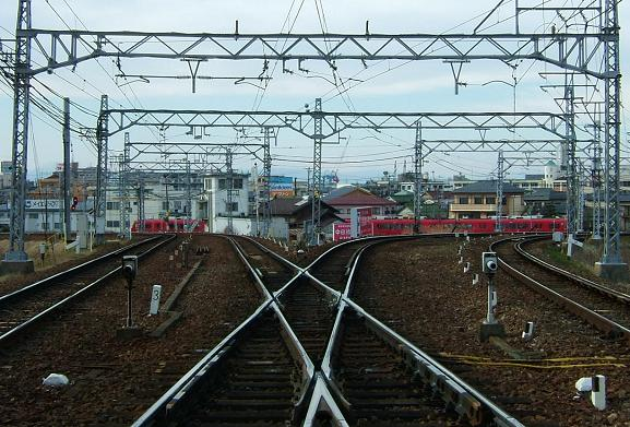 愛知県西春日井郡西枇杷島町橋詰町に所在する名古屋鉄道の枇杷島分岐点。 画像右が名鉄犬山線、左が名鉄名古屋本線の路線となっている。 投稿者 Gnsin 撮影日&場所 2005年3月6日(日) 愛知県西春日井郡西枇杷島町の枇杷島分岐点付近の踏み切りにて撮影。